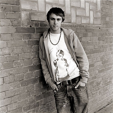 Clueso in Erfurt